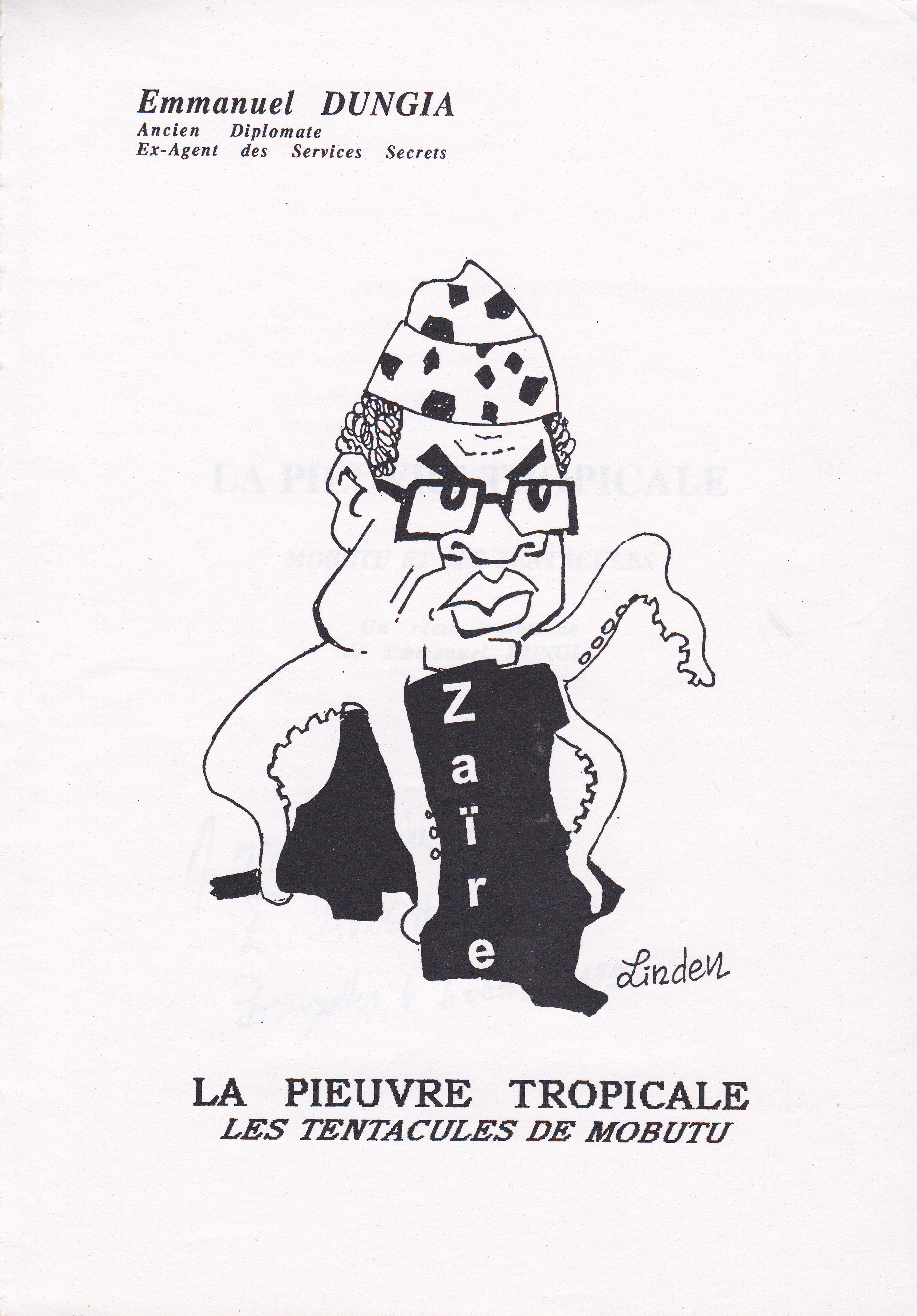 La pieuvre tropicale Emmanuel Dungia Zaire RDC.